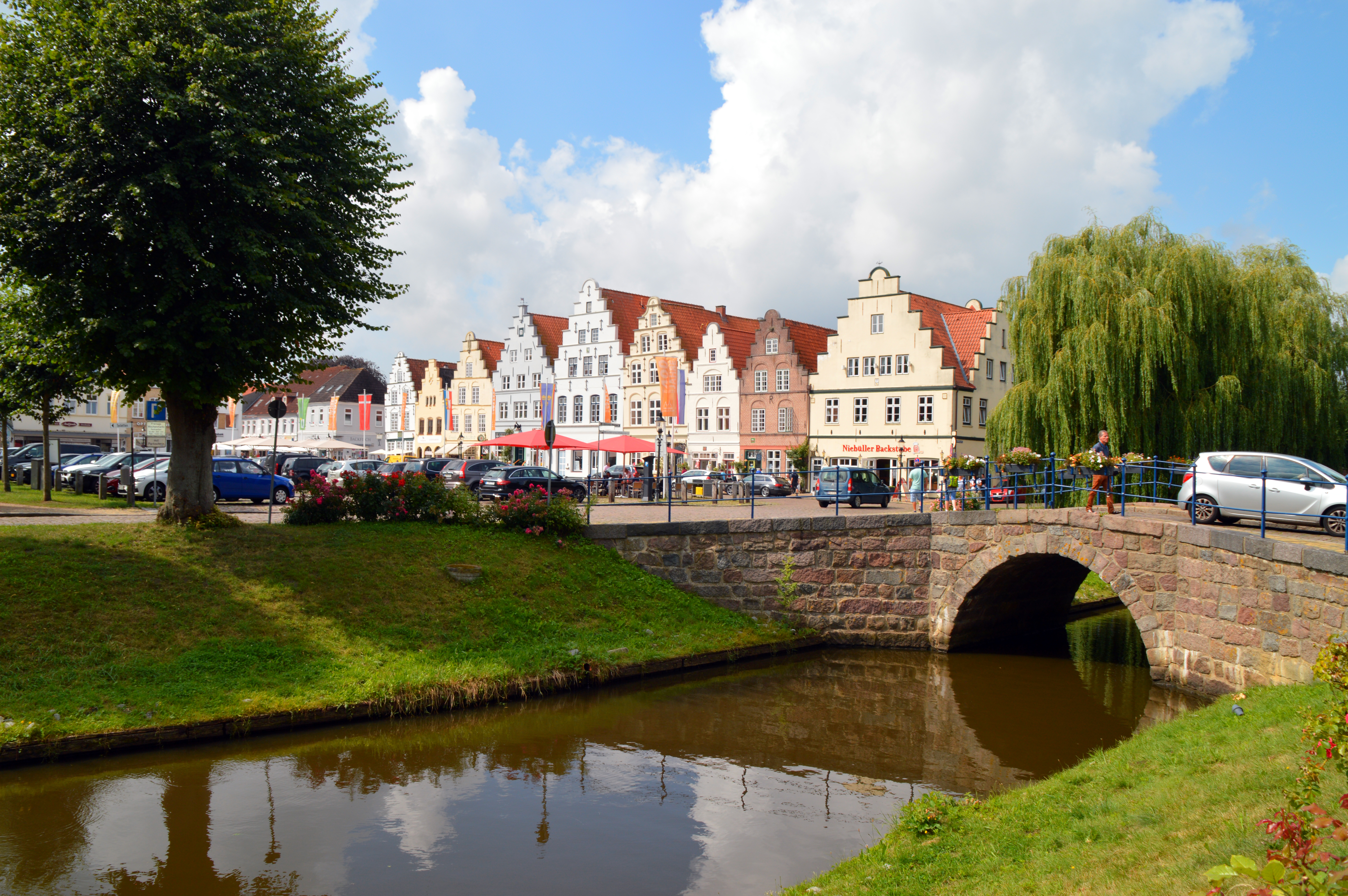 Friedrichstadt Holländerhäuser Sleeswijk-Holstein Duitsland.